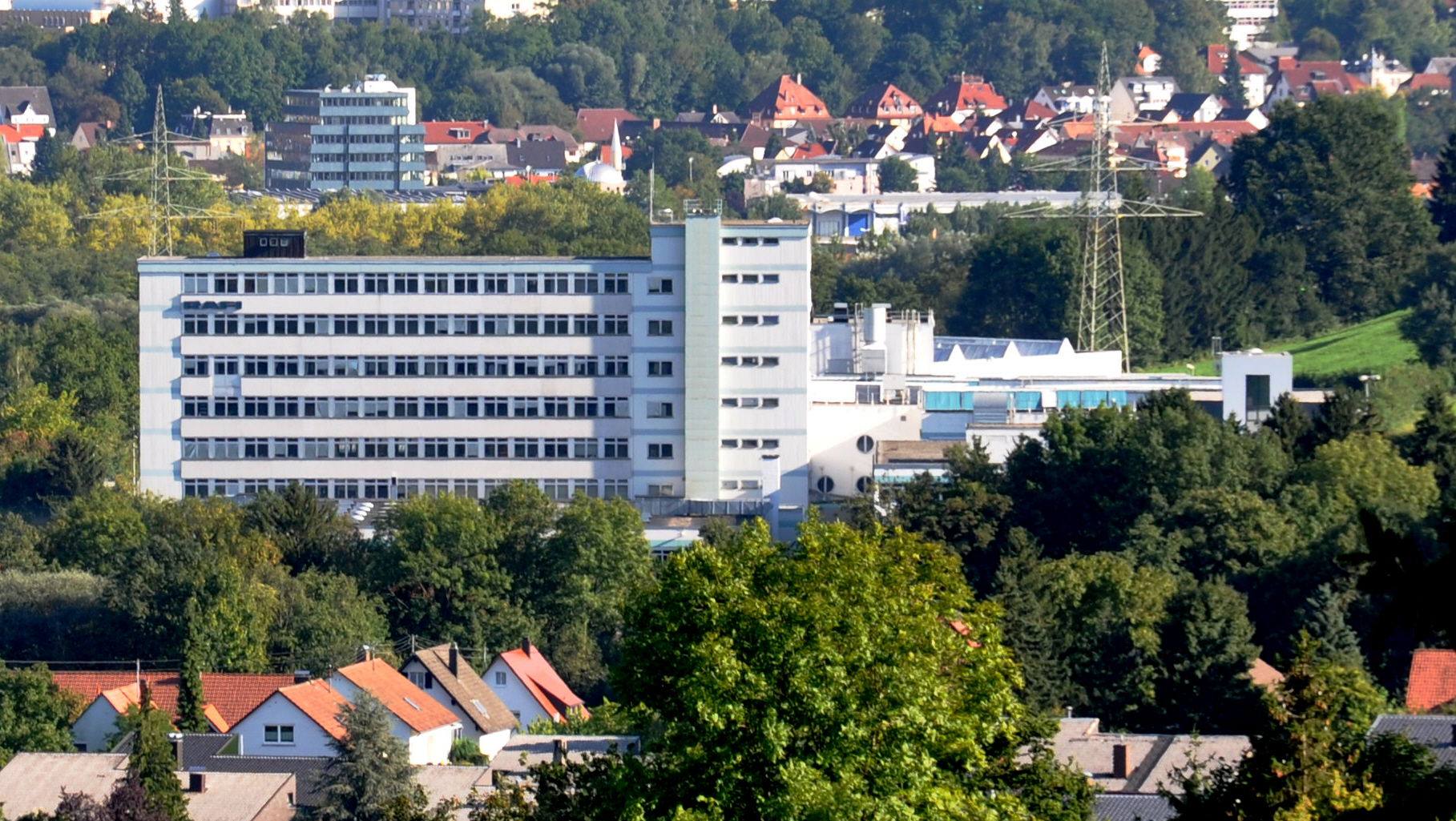 Fa. Rafi, 88276 Berg (Landkreis Ravensburg), im Hintergrund die Ravensburger Nordstadt